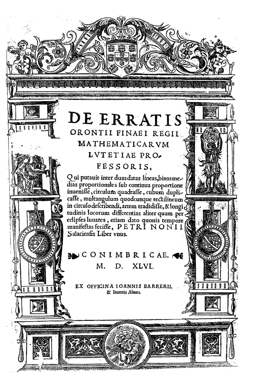 De erratis Orontii Finaei regii mathematicarum Lutetiae professoris, qui putauit inter duas datas lineas, binas medias proportionales sub continua proportione inuenisse, circulum quadrasse, cubum duplicasse, multangulum quodcunque rectilineum in circulo describendi, artem tradidisse, & longitudinis locorum differentias aliter quam per eclipses lunares, etiam dato quouis tempore manifestas fecisse, Petri Nonii Salaciensis liber vnus. - Conimbricae : ex officina Ioannis Barrerii, & Ioannis Aluari, 1546. - [4], 92 p. : ill. ; fol. .